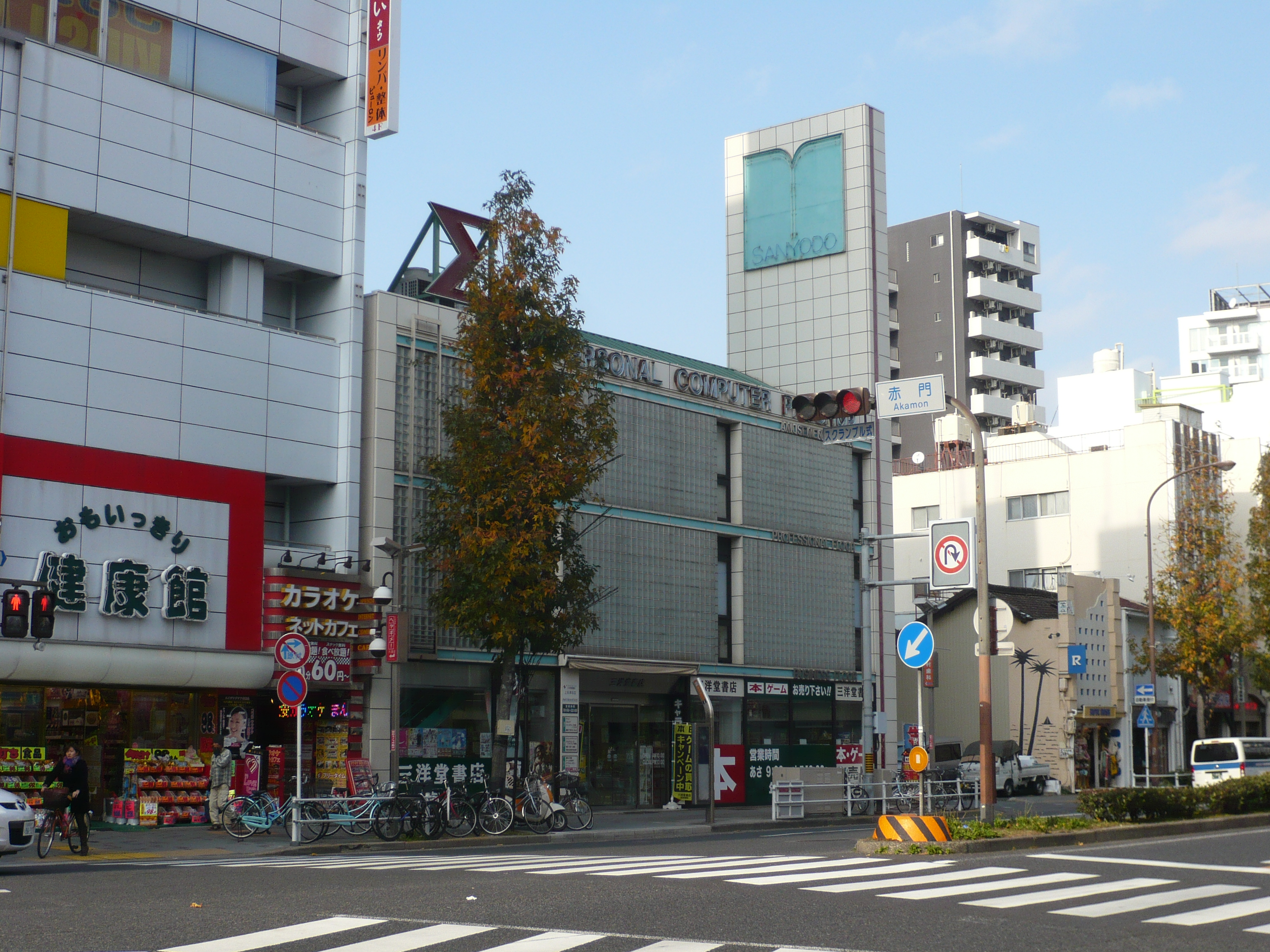 三洋堂書店上前津店